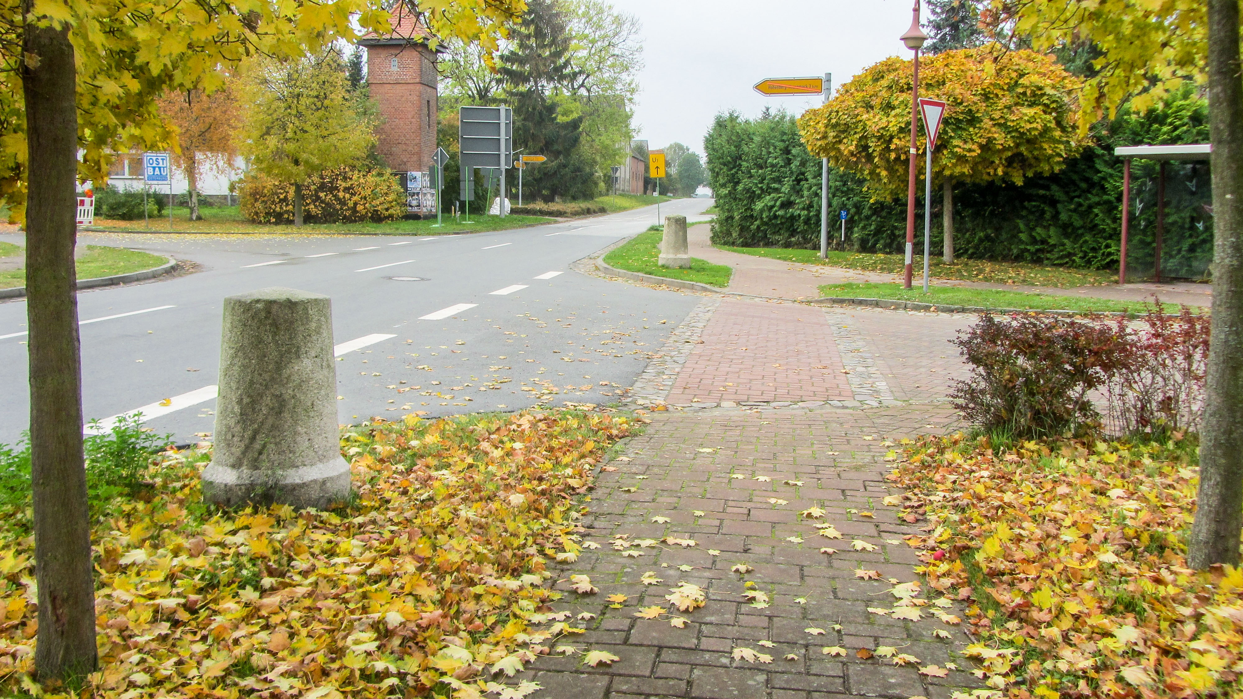 Preußischer Rundsockelstein (0938) in Hindenburg, an der L 16 Einmündung K1464, Werbener Straße / Breite Straße nach Krusemark in Hohenberg-Krusemark OT Hindenburg. Im Hintergrund Preußischer Rundsockel (0937).